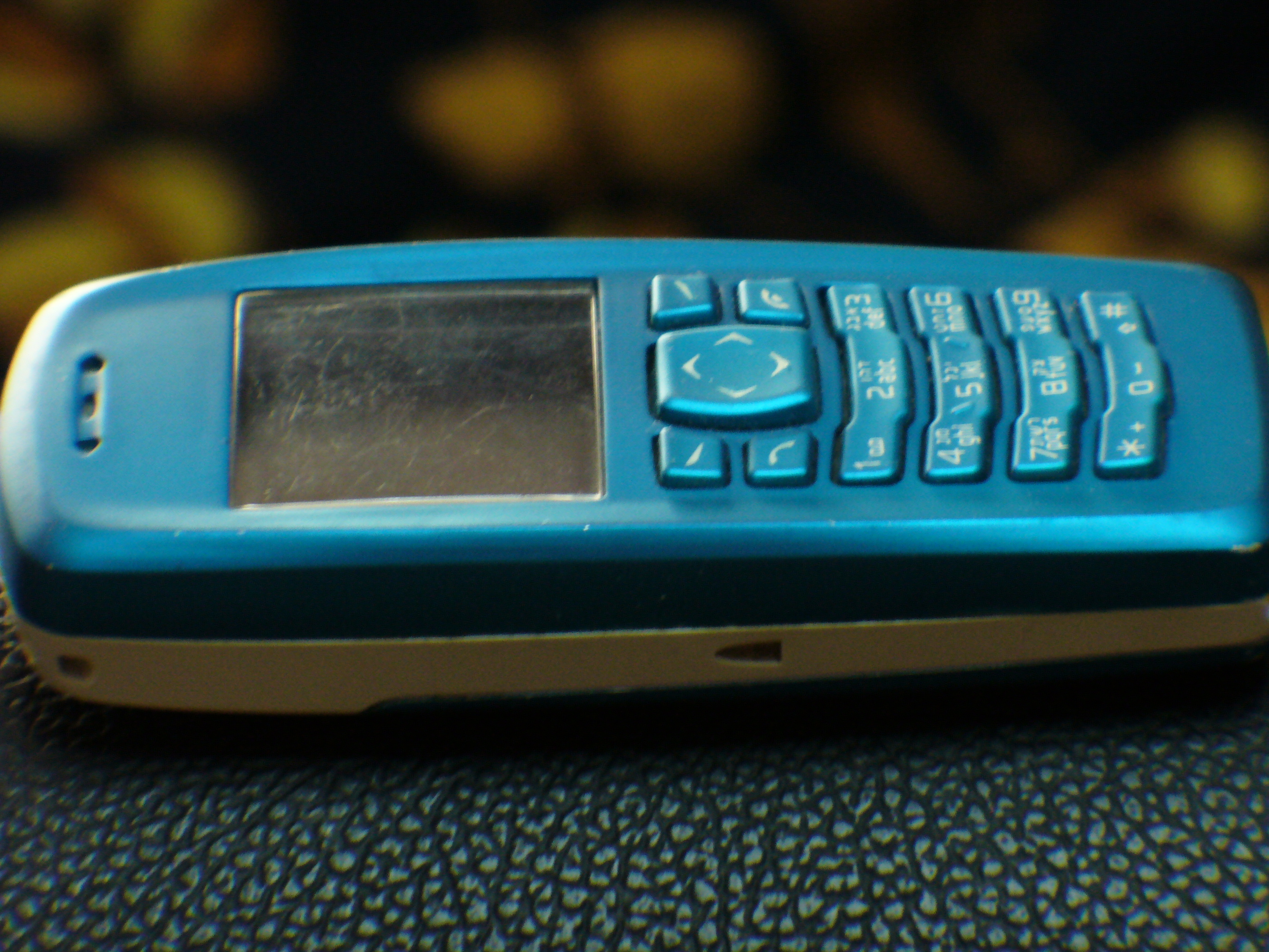 Nokia 3100, side view